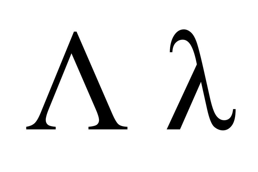 greek letter lambda